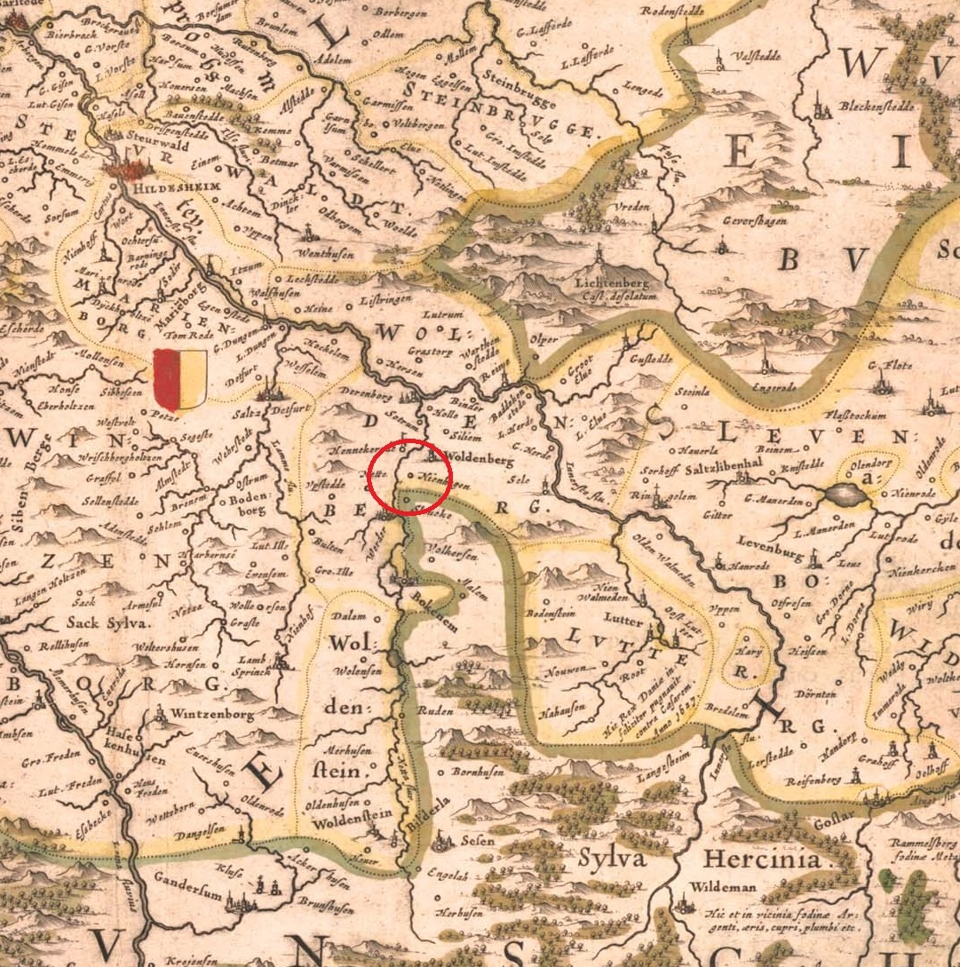 Das Hochstift Hildesheim 1645, Ausschnitt mit Markierung (rot) von Gut Nienhagen